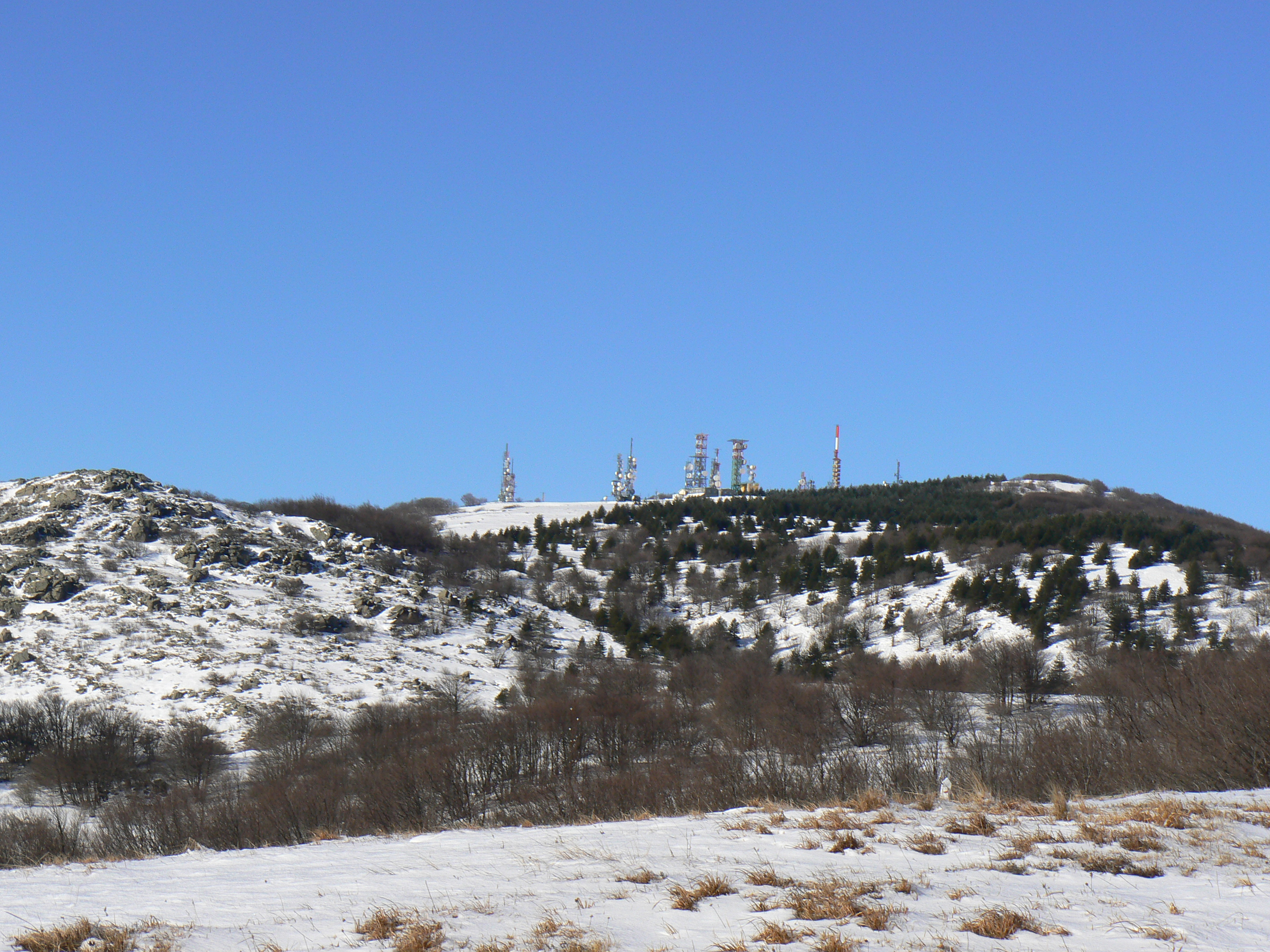 Selva di antenne sul monte Beigua in versione invernale